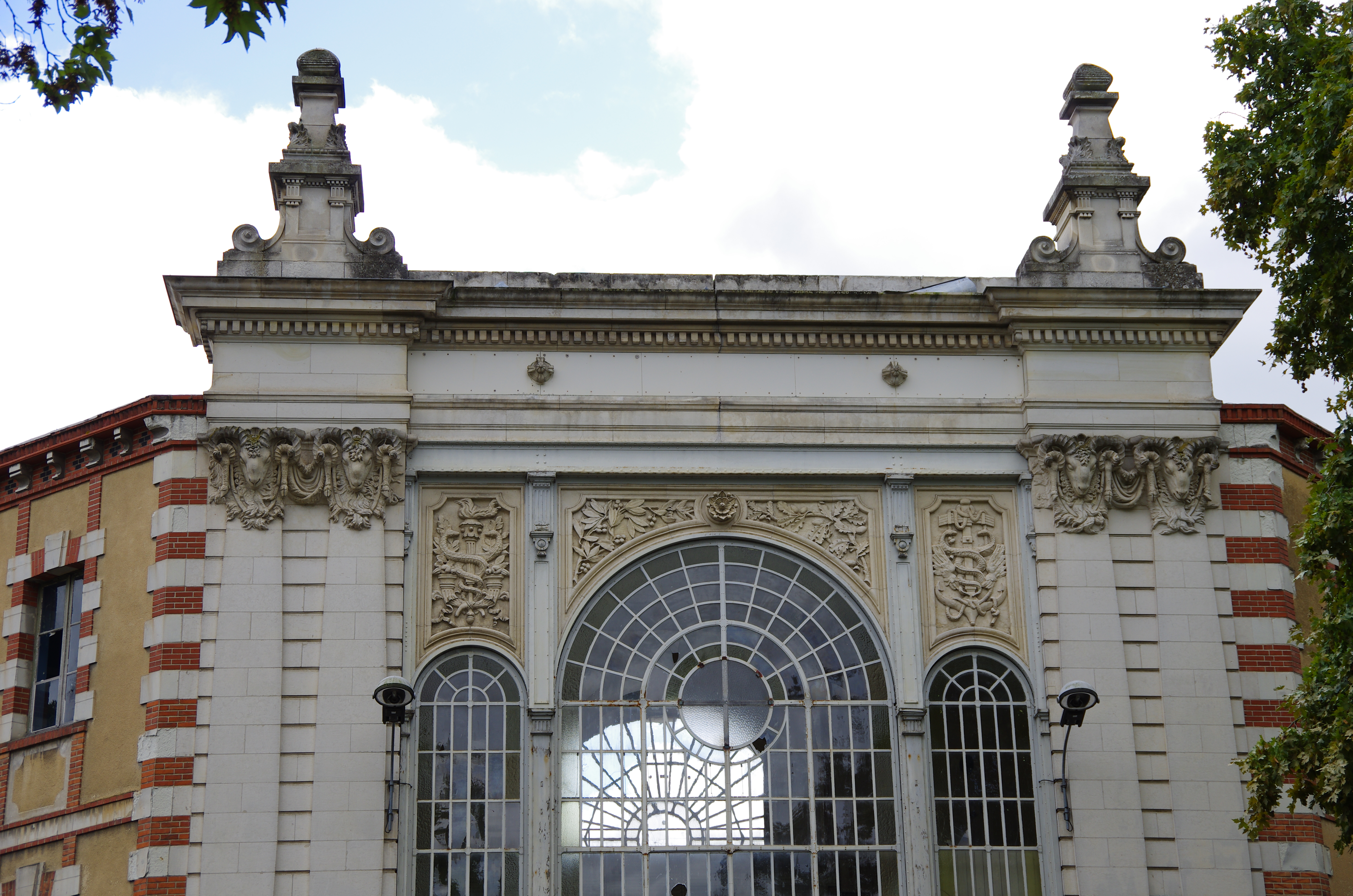 Usine Normant, puis Matra Automobile, à Romorantin-Lanthenay (Loir-et-Cher, France) .